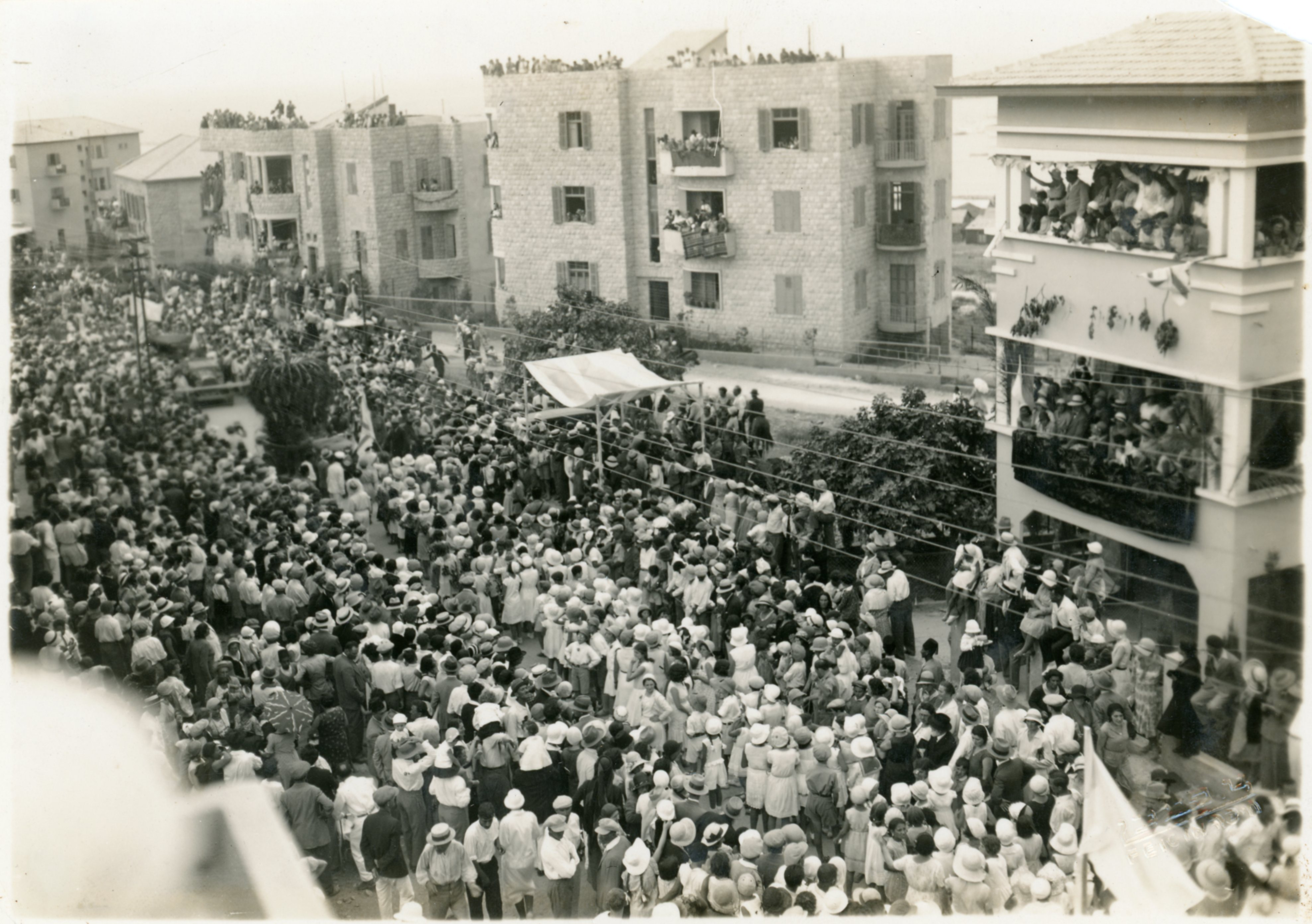 באדיבות ארכיון העיר חיפה